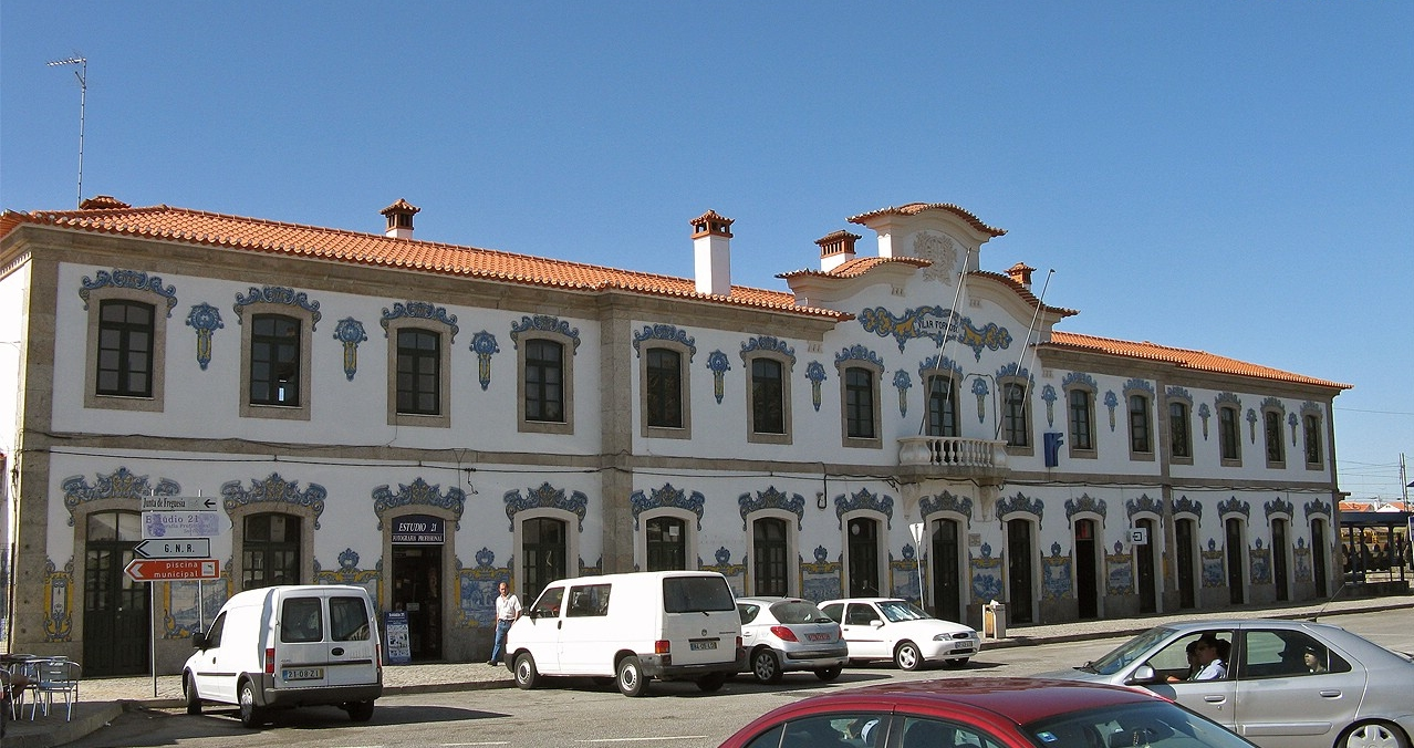 Estación de Vilar Formoso.